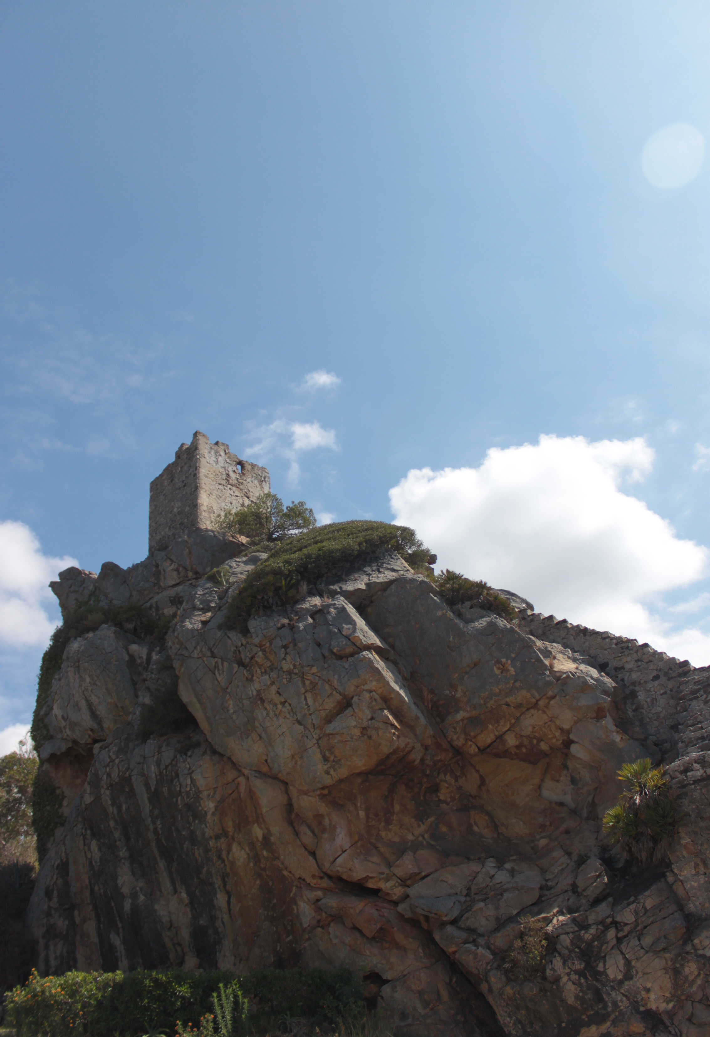 Torre de la Peña en Tarifa, Andalucía, España